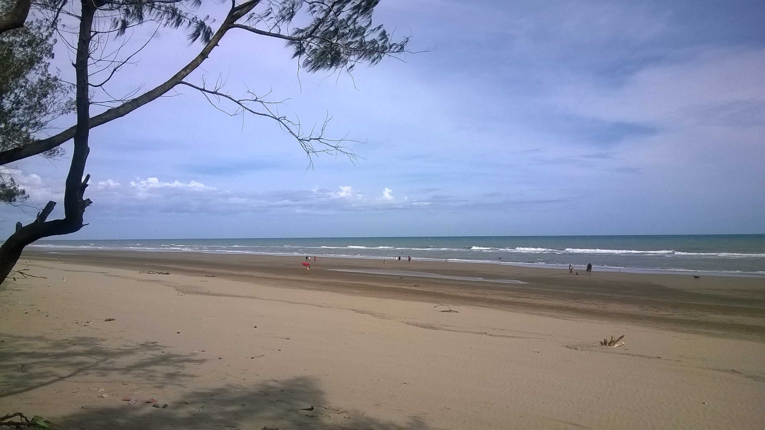 Tuafanu, Kualin, South Timor Tengah Regency, East Nusa Tenggara, Indonesia